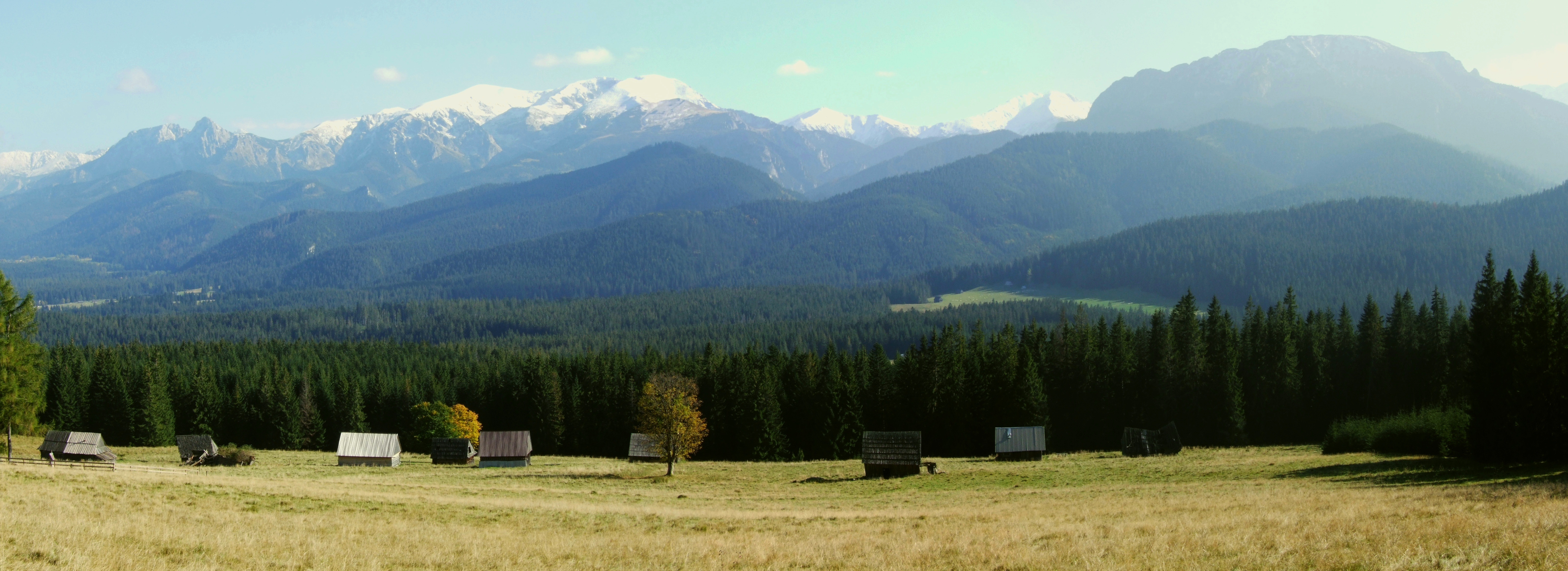 Widok z polany Koszarzyska na Przysłopie Witowskim